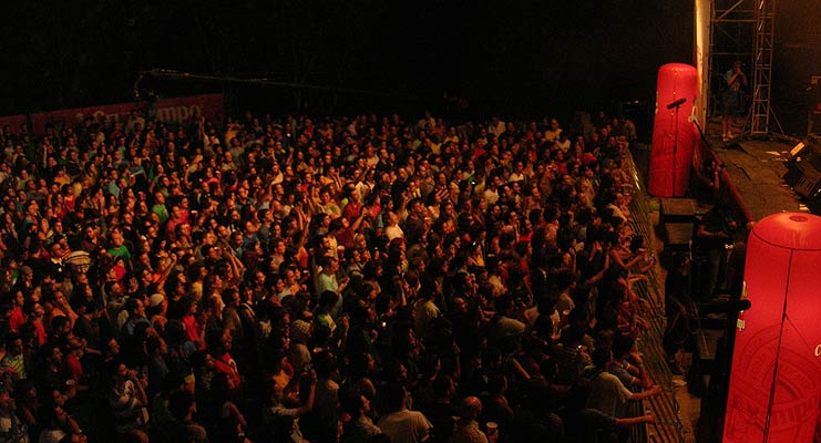 Público de La Buena Vida en el festival Contempopránea. Badajoz